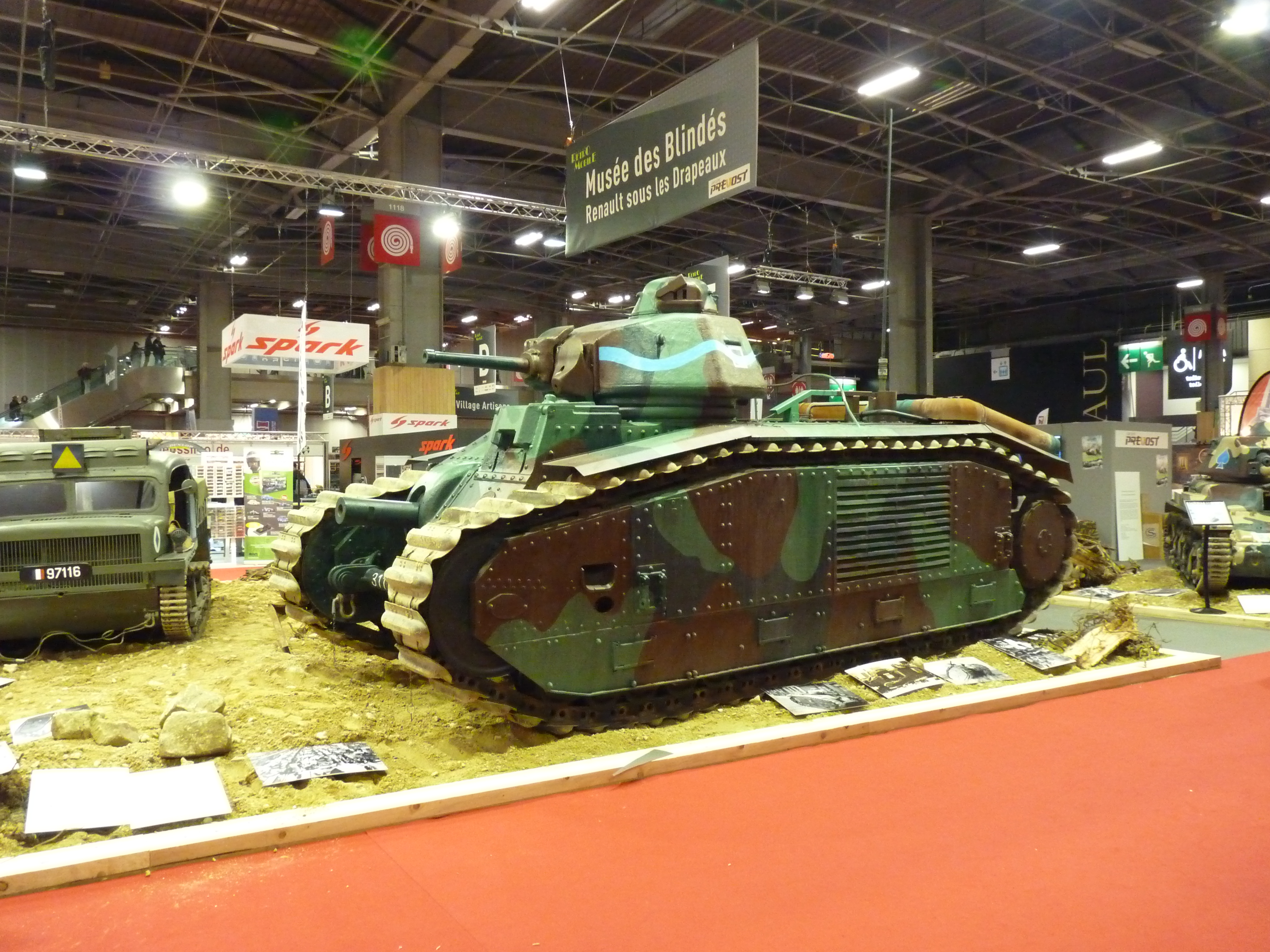 Rétromobile 2018 - 120 ans de Renault - Musée des blindés